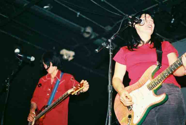 Kelley deal 6000, Tulsa, OK